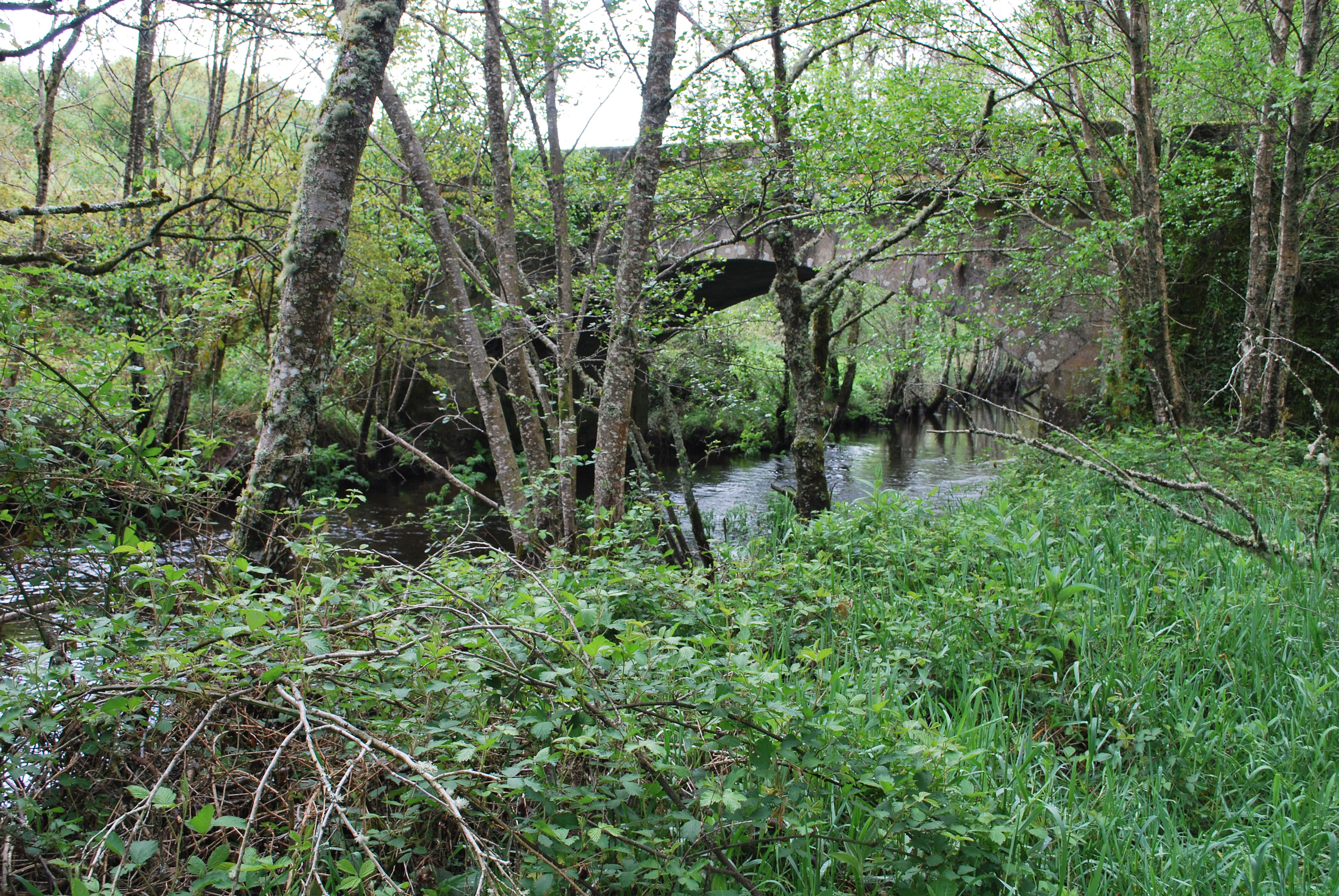 Vista vella ponte AC-231 estrada A Castellana Sobrado Curtis A Coruña Galiza Spain